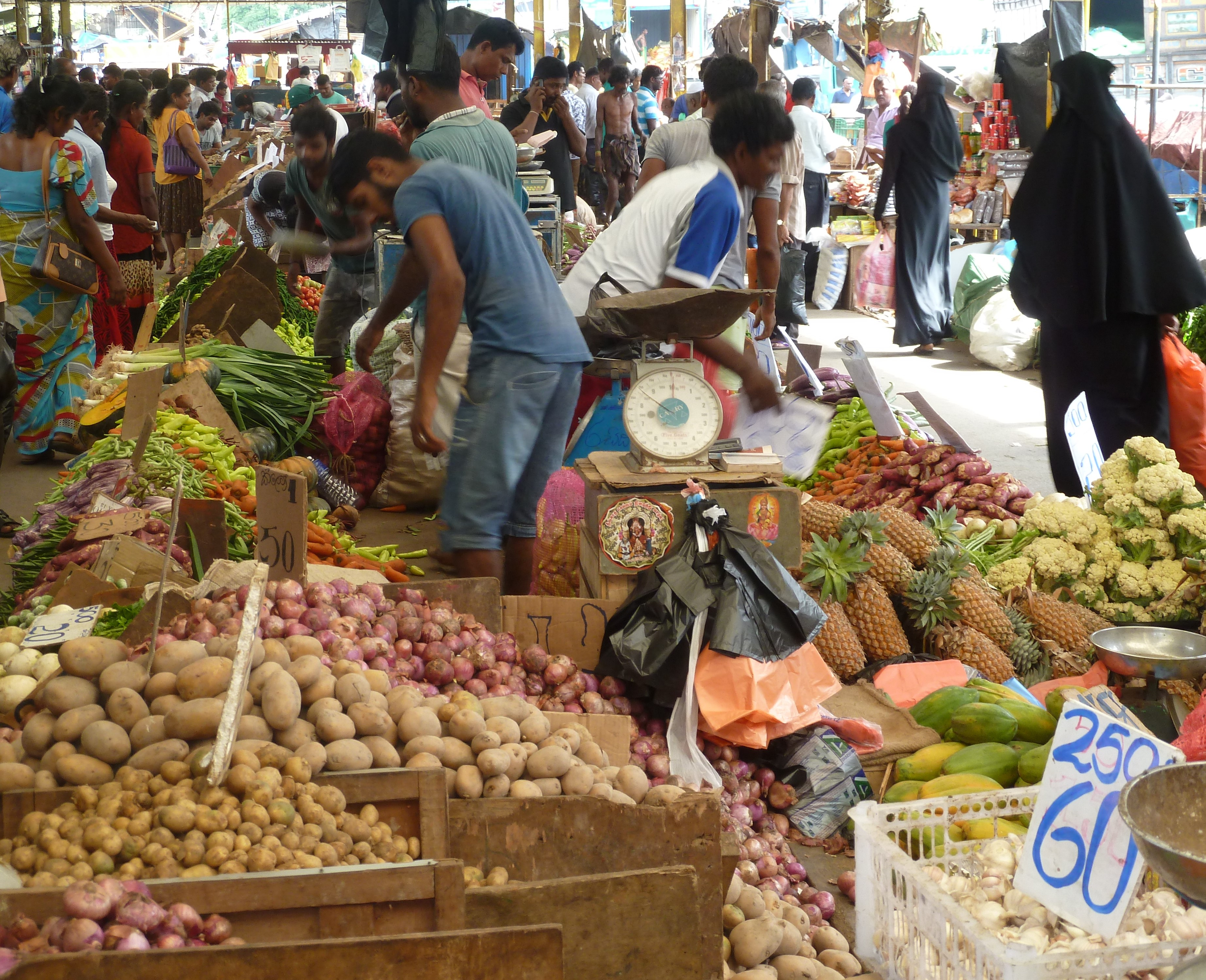 le marché Pettah à Colombo, Sri Lanka.- Asie du Sud